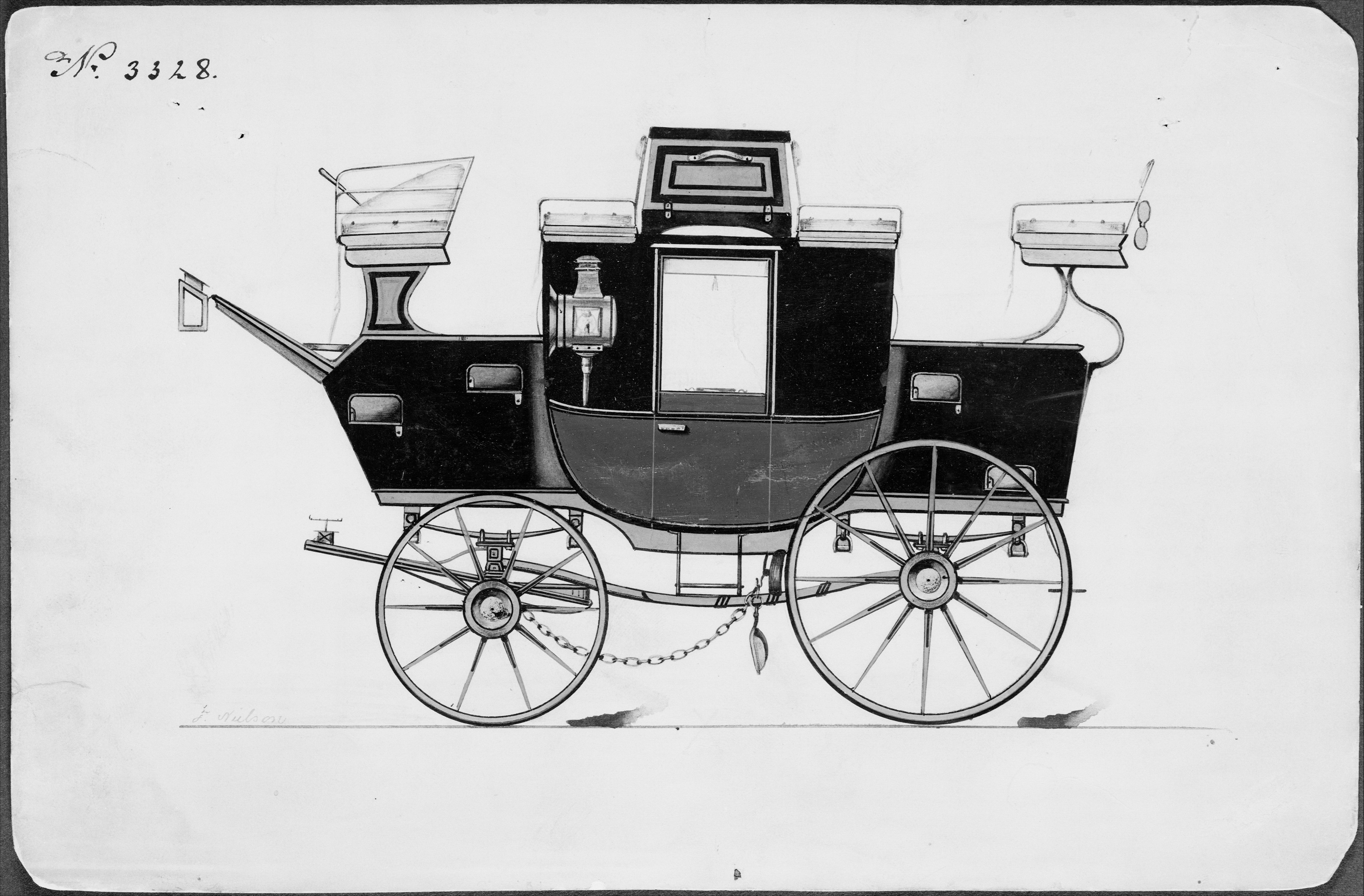 Drawing; Drawings